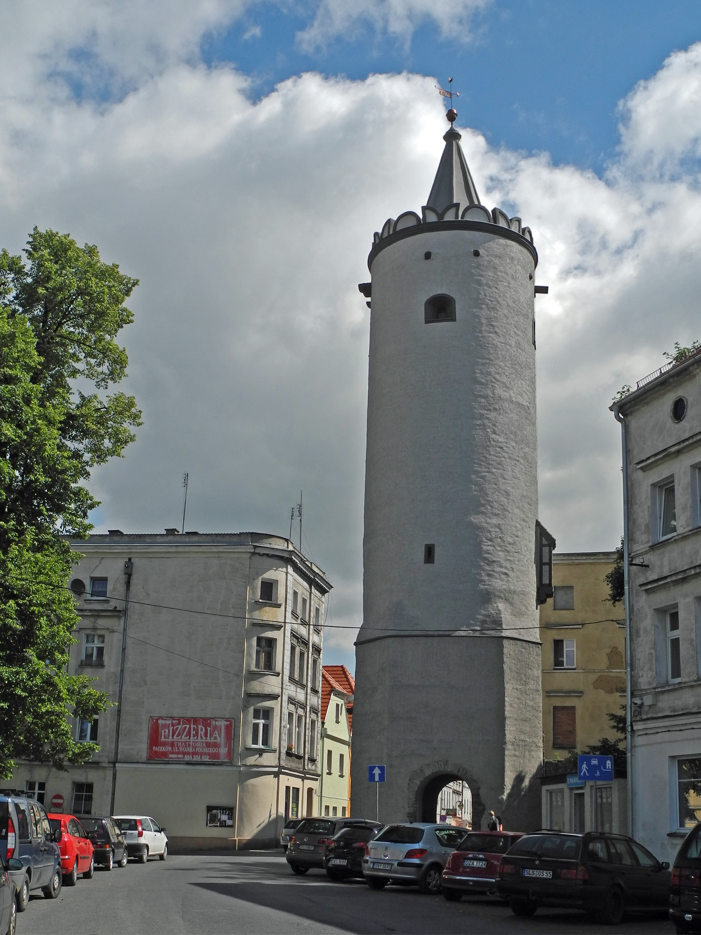 Glatzer Tor in Paczków (Patschkau) in Schlesien.